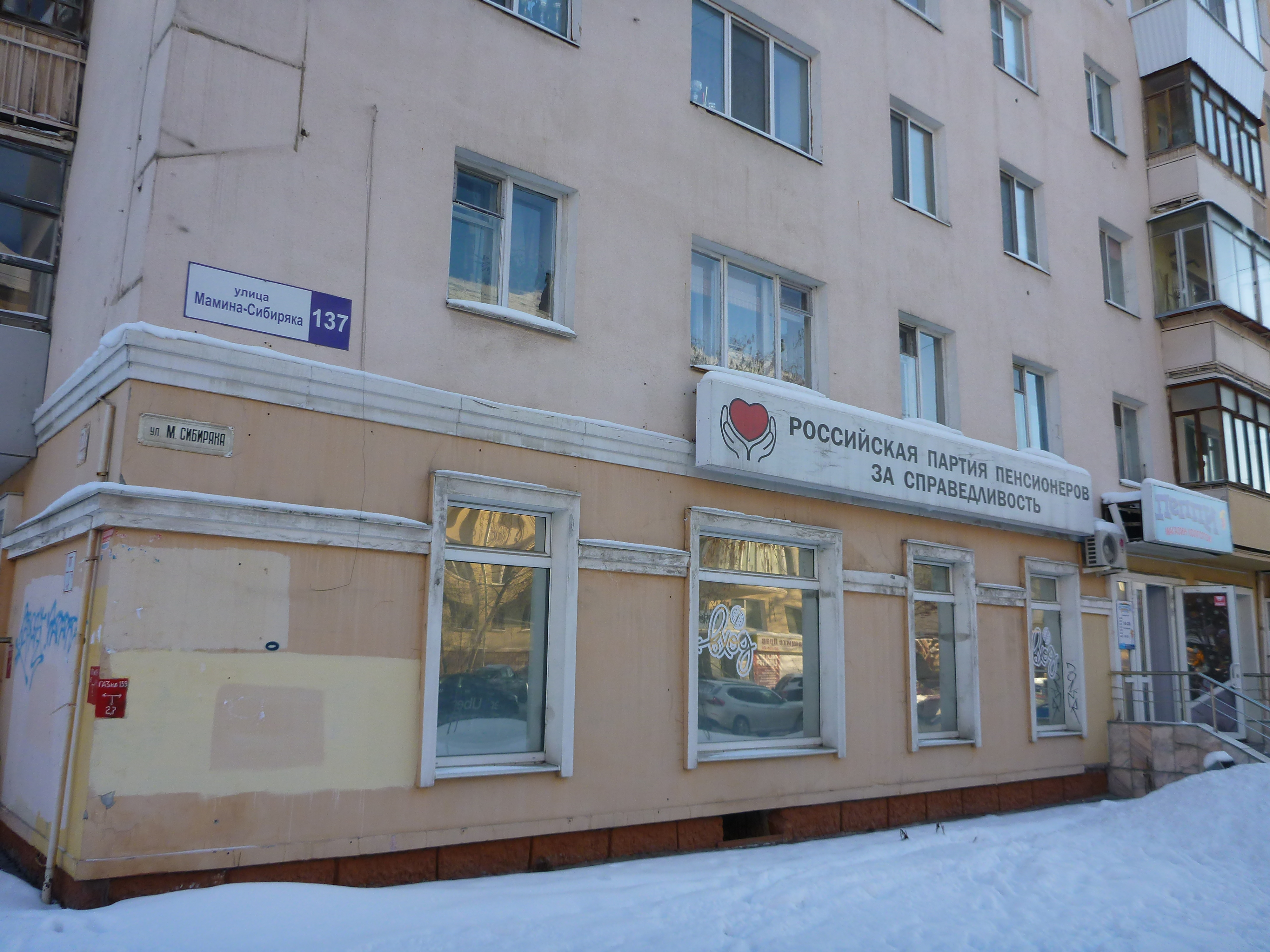 Вход в отделение Российской партии пенсионеров за справедливость в Екатеринбурге 2020 год